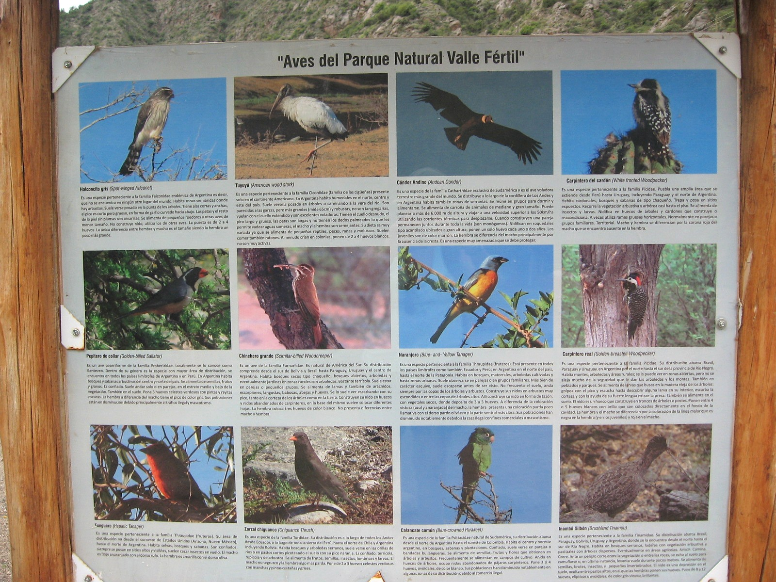 Indicador de aves en la Reserva de uso múltiple Valle Fértil, departamento Valle Fértil, San Juan, Argentina